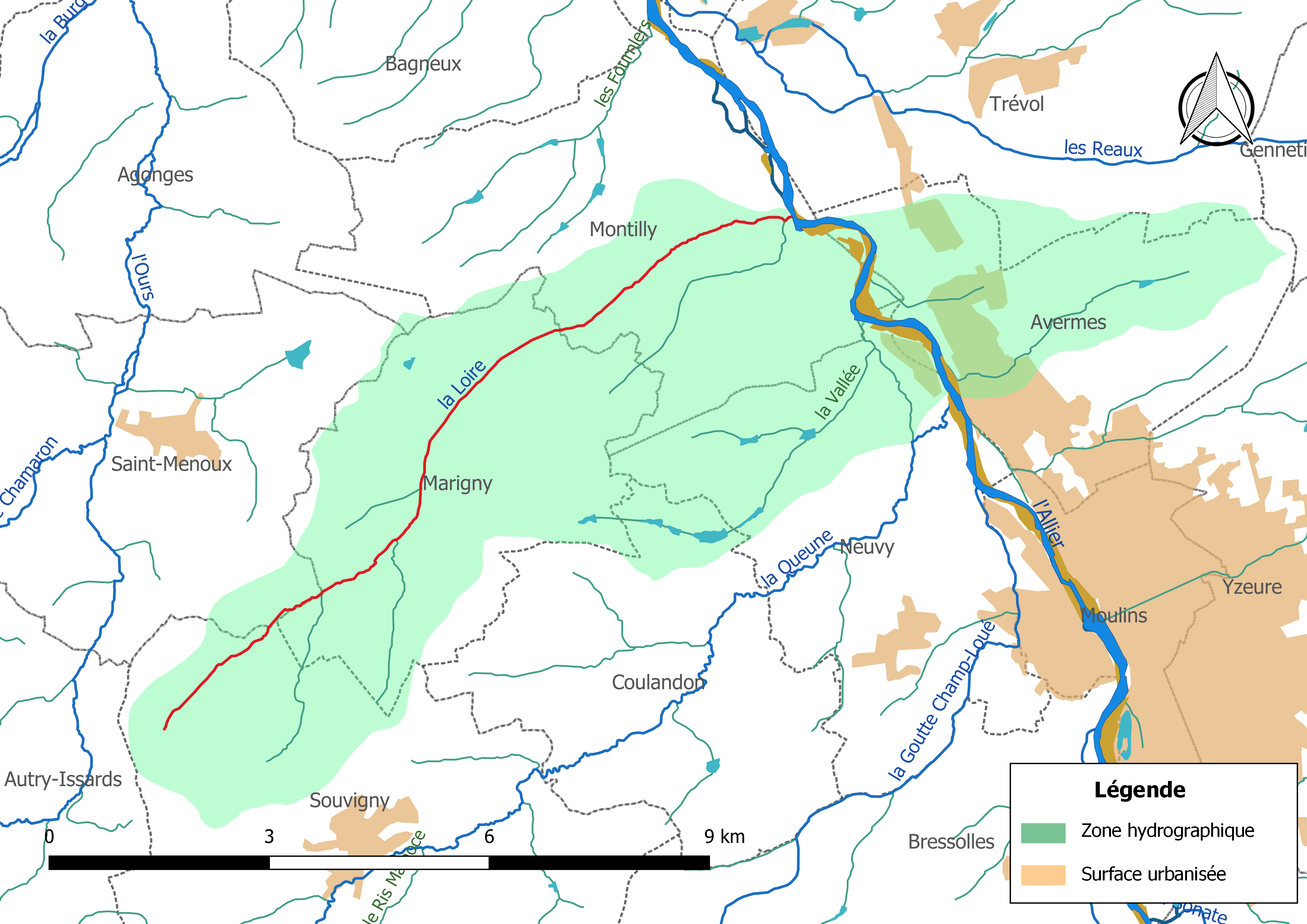 Carte du cours d'eau « la Loire », affluent de l'Allier, (France) et de la zone hydrographique dans laquelle il s'insère.